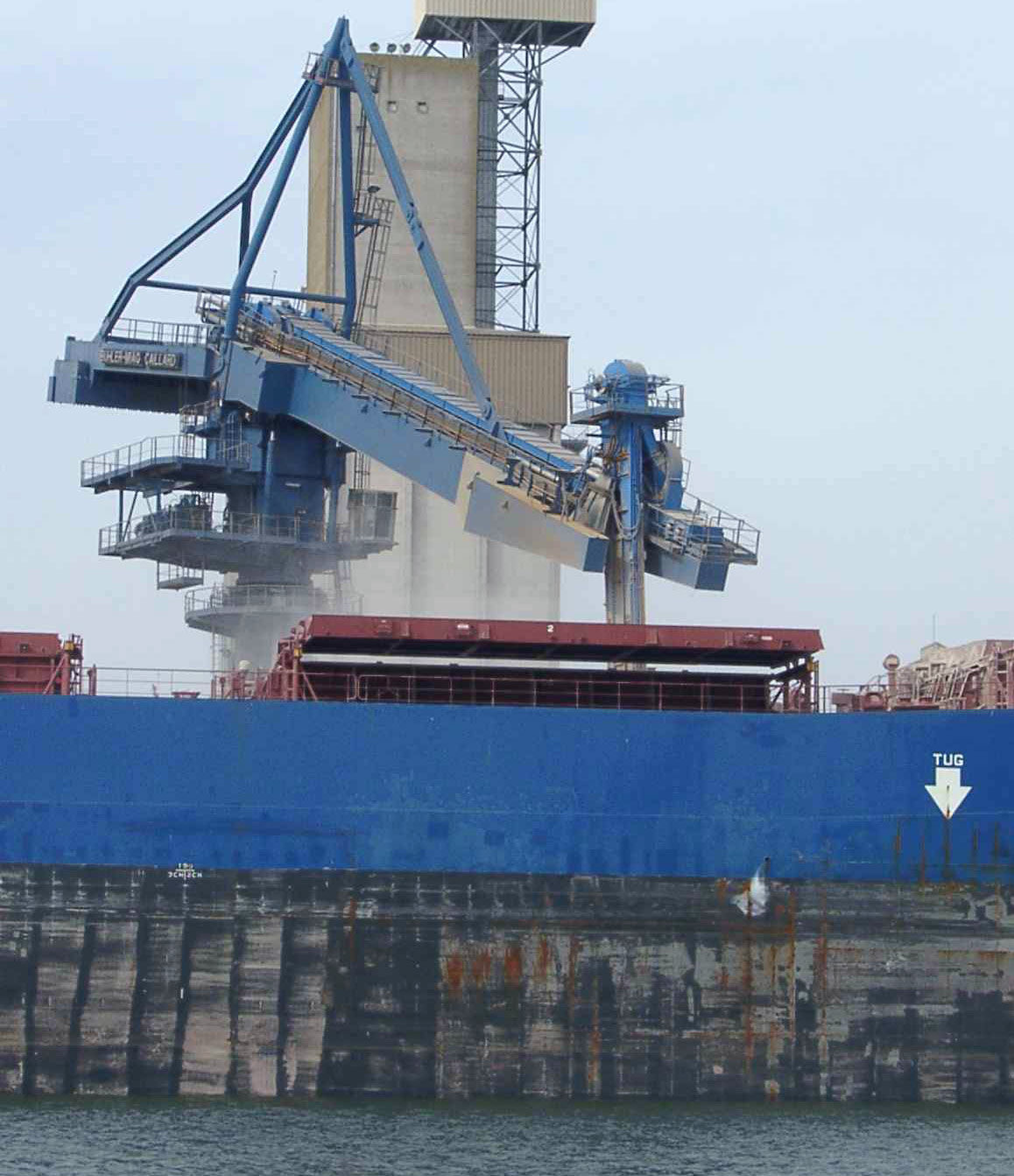 Description : Grue kangourou en pleine action au Port de commerce de Lorient Lieu : Lorient, Bretagne, France Date : 2004 Auteur : Pline Photo Personnelle